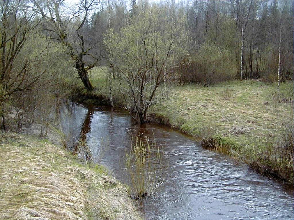 Sita pie Sitas stacijas 2001-04-28